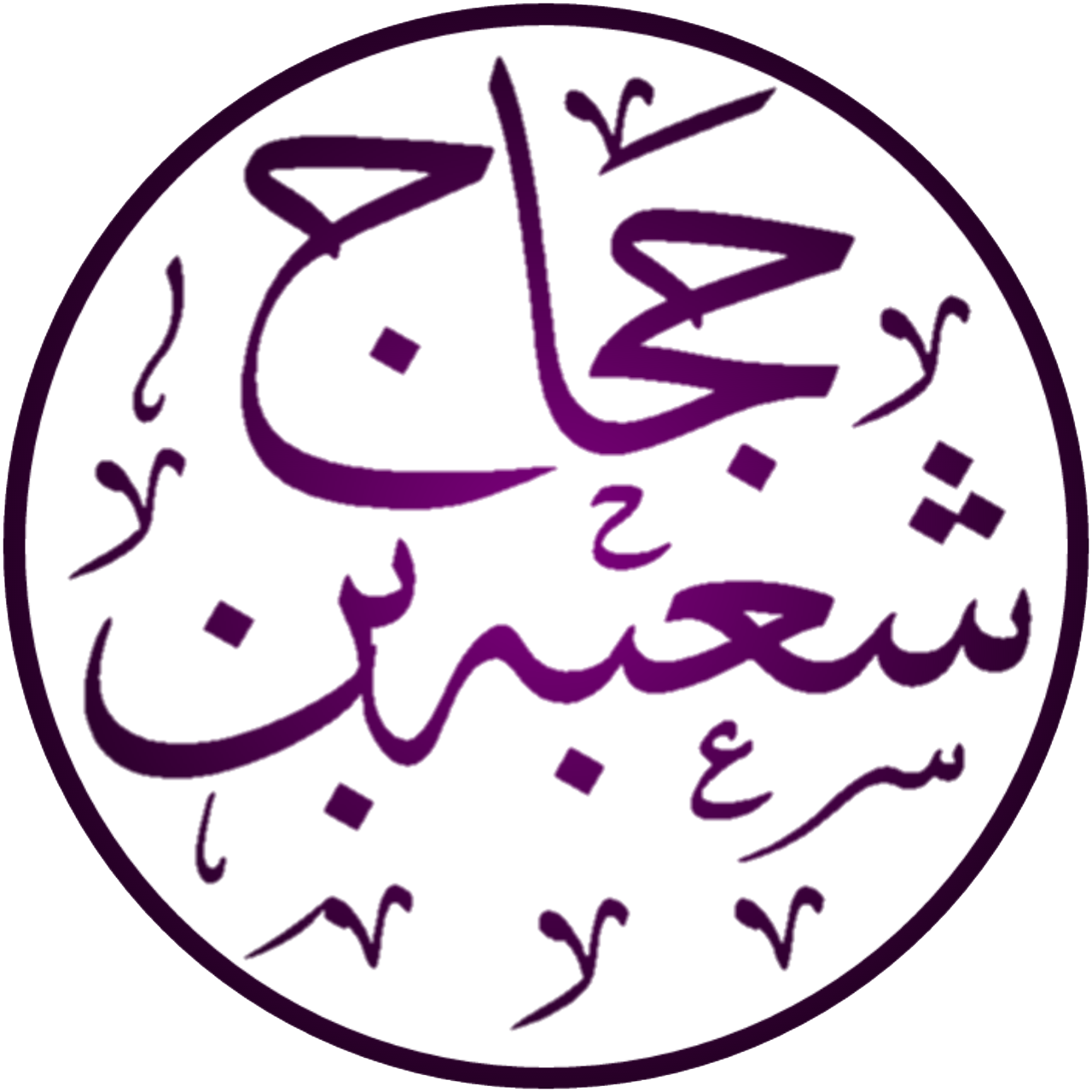 شعبہ بن حجاج